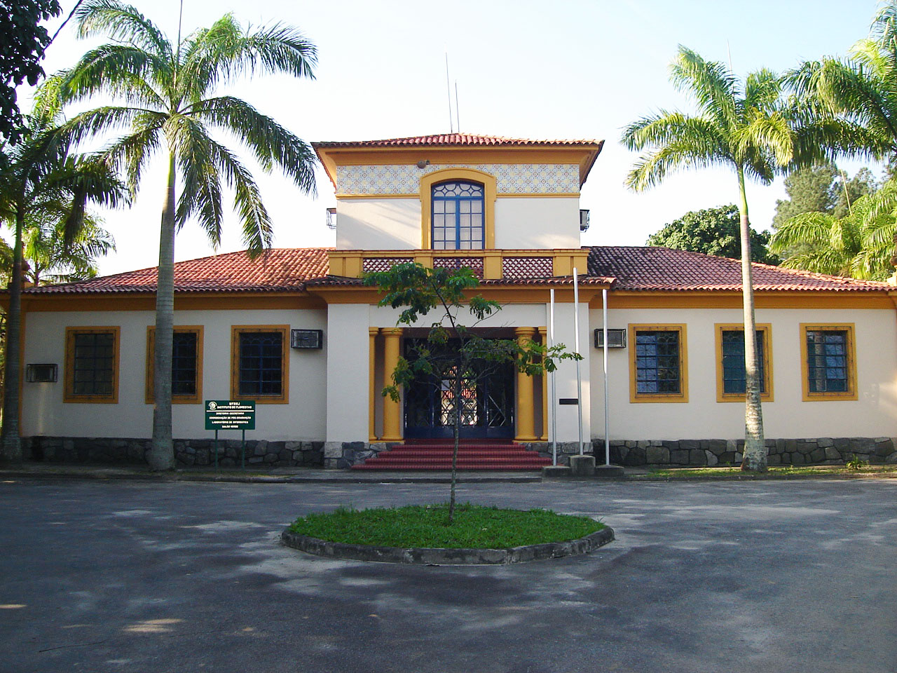 Prédio do Instituto de Florestas, UFRRJ, Seropédica, RJ